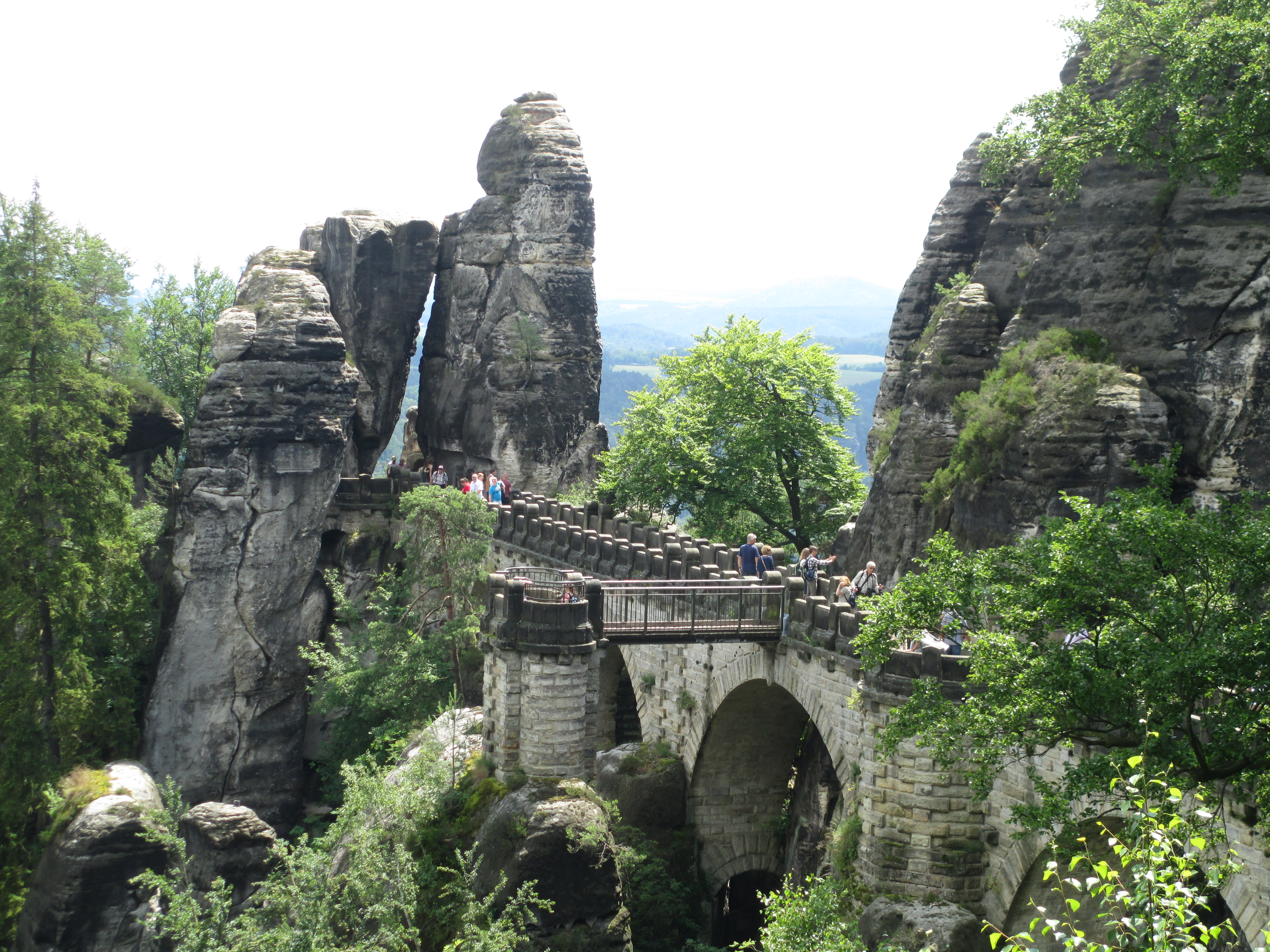 שמורת בסטאי